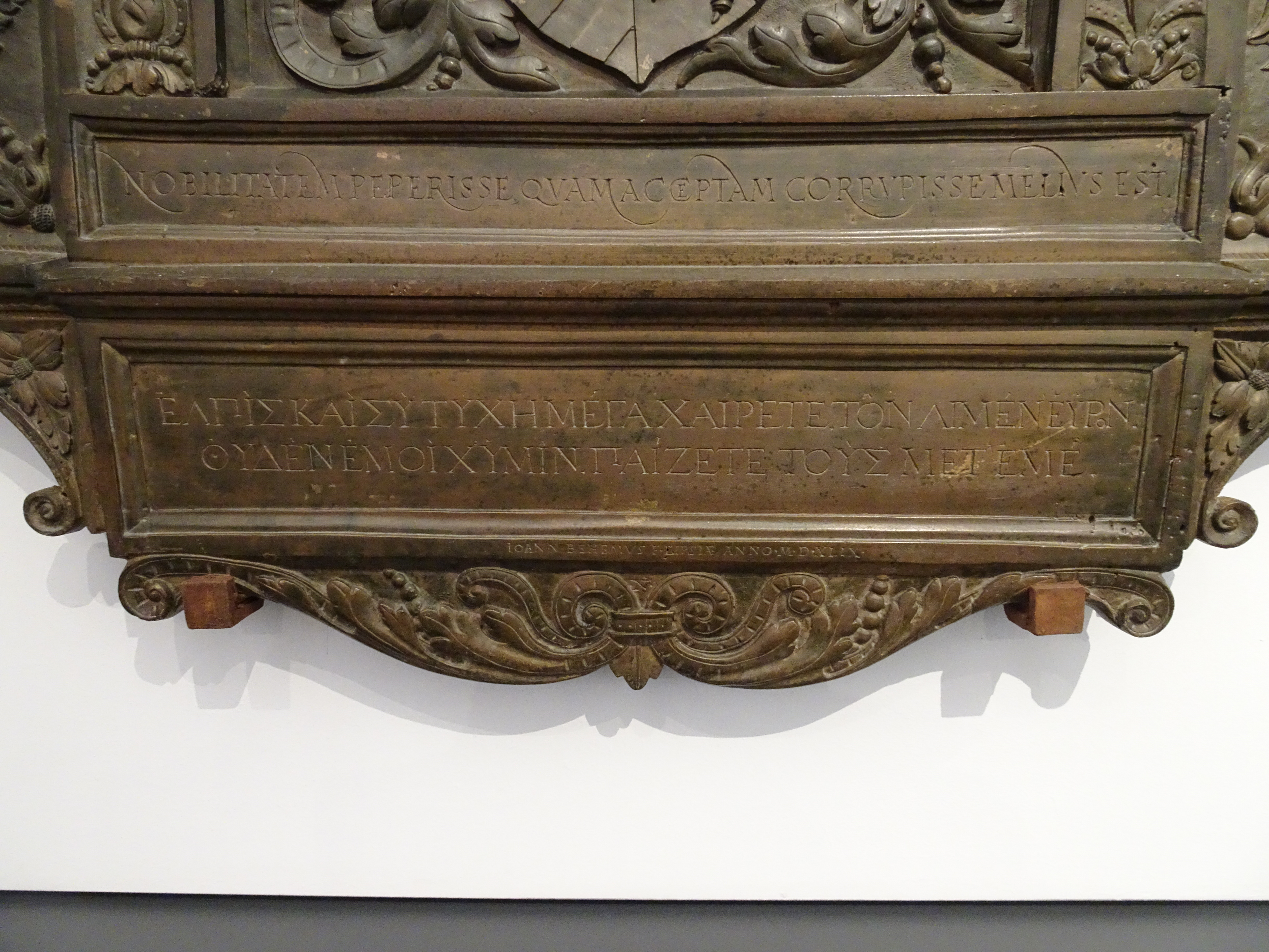 Detail des Epitaphs für Christoph "Türk" von Kruschwitz in der Universitätskirche St. Pauli zu Leipzig